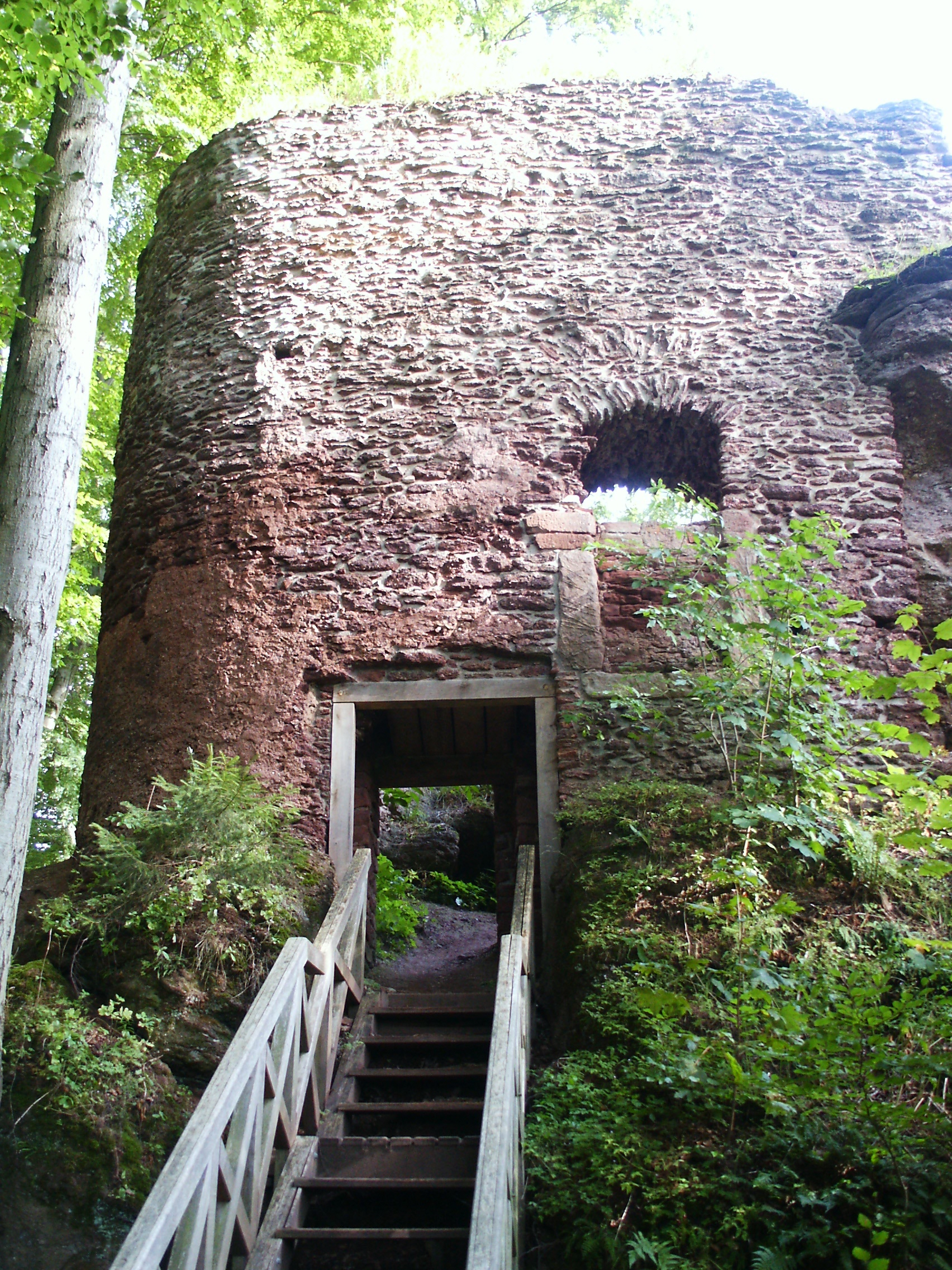 Hrad Břečtejn, nad osadou Hrádeček - vstup.